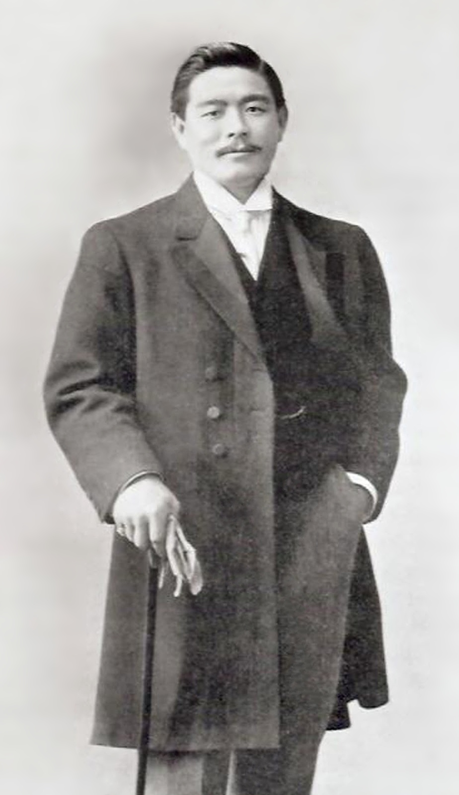 Mitsuyo Maeda